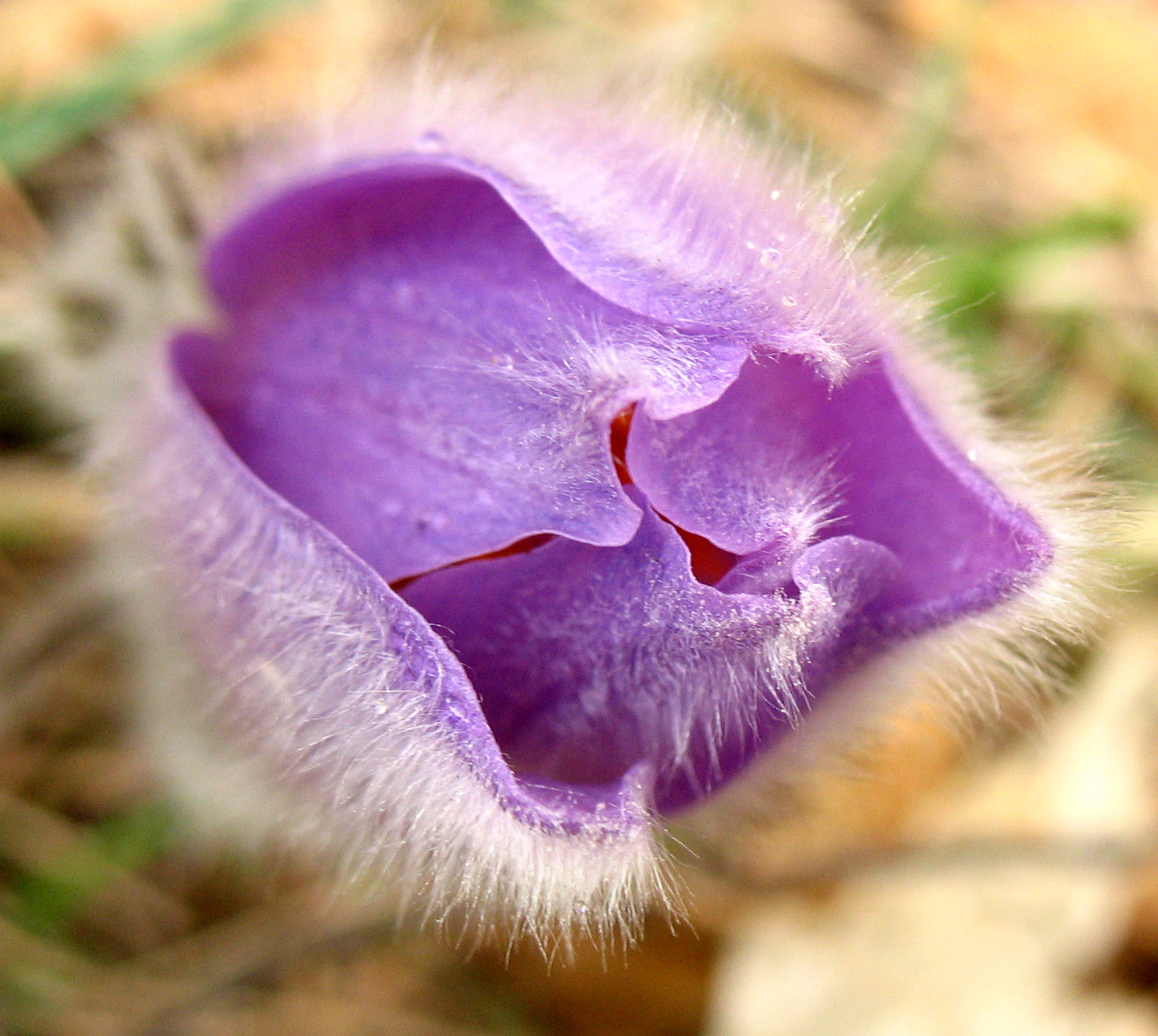 Планинско котенце (Pulsatilla montana)